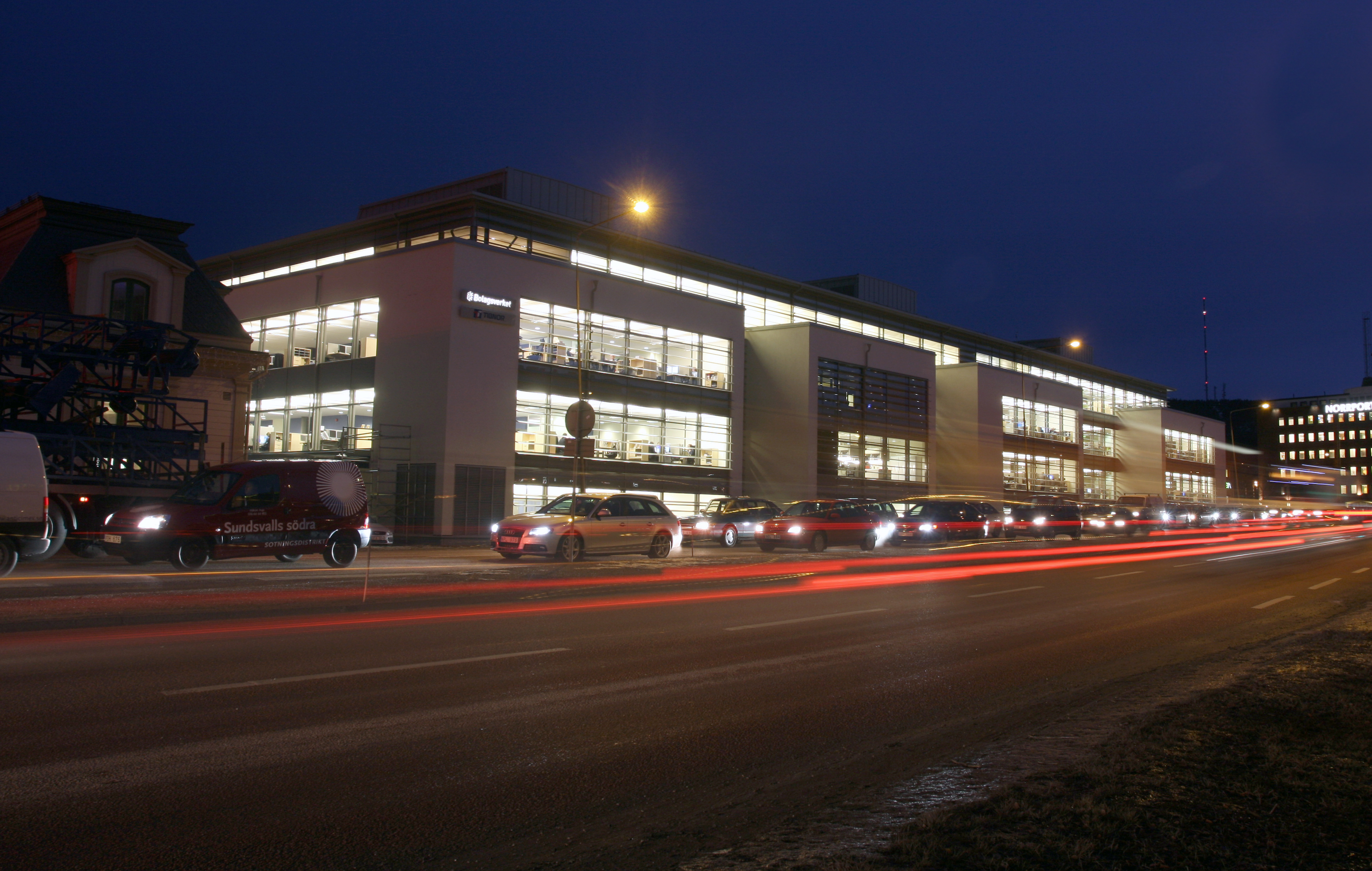 Bolagsverket in Sundsvall, Sweden